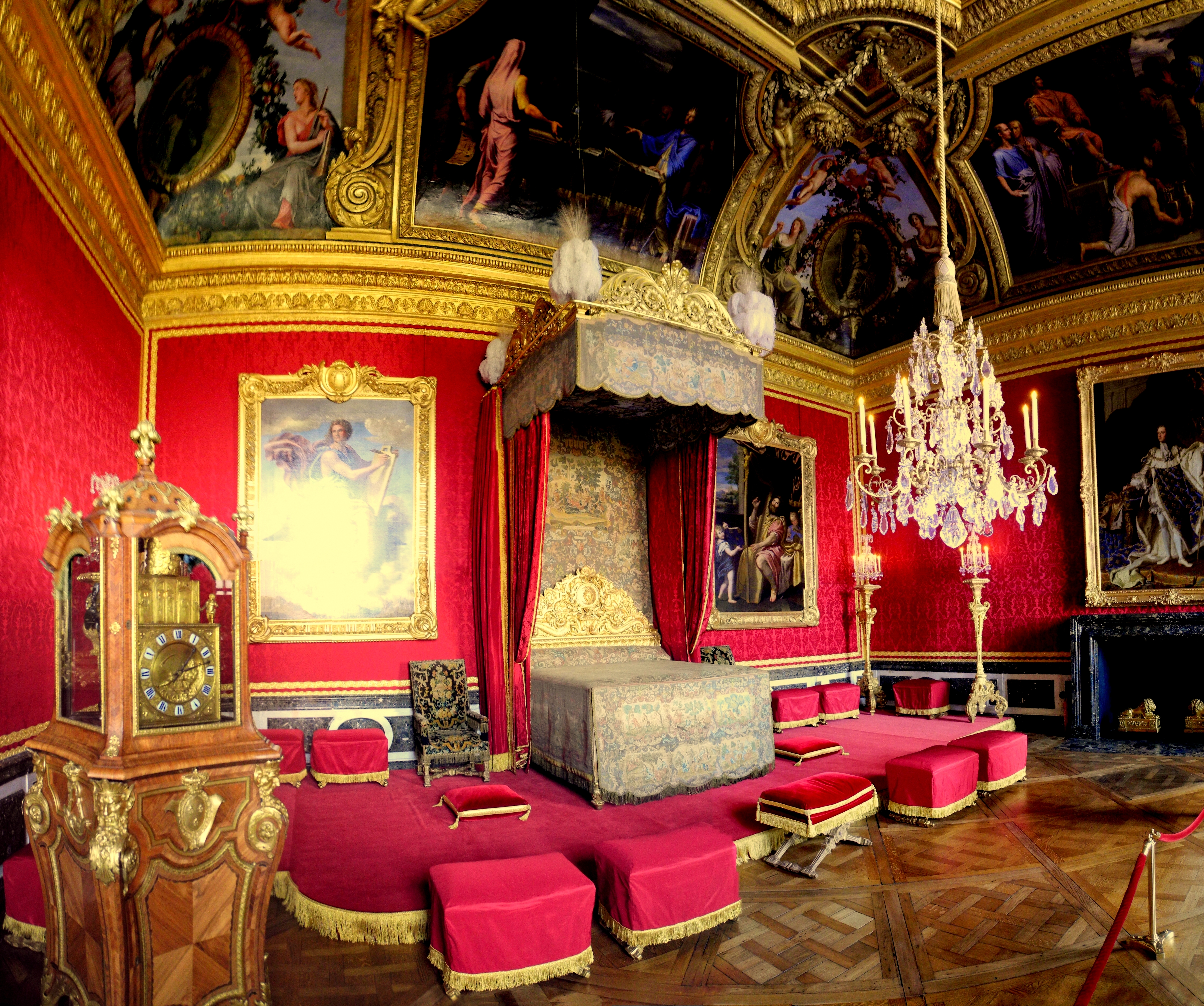 Lit rouge